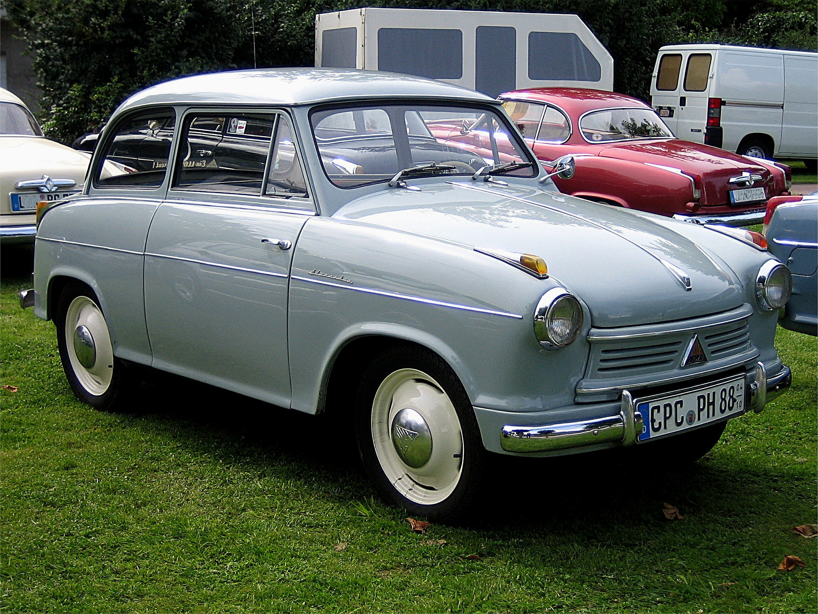 Lloyd Alexander